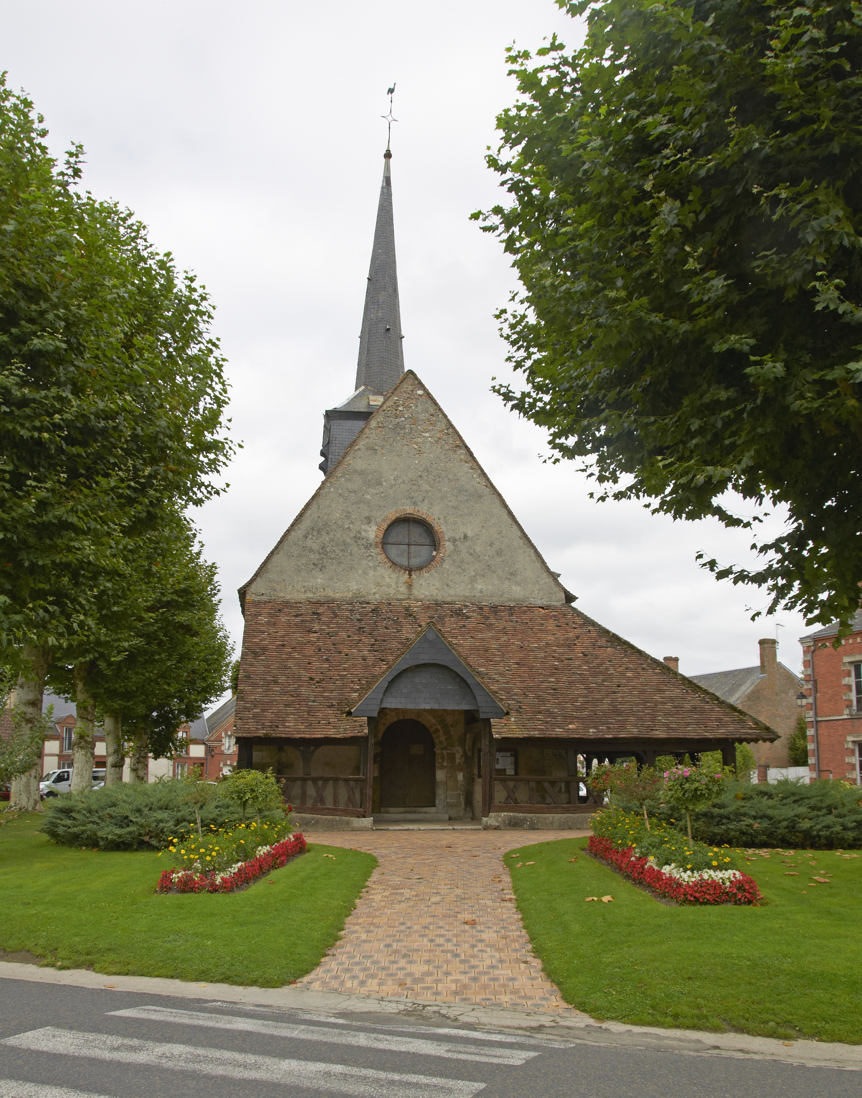 Église Saint-Martin de Souvigny-en-Sologne, France